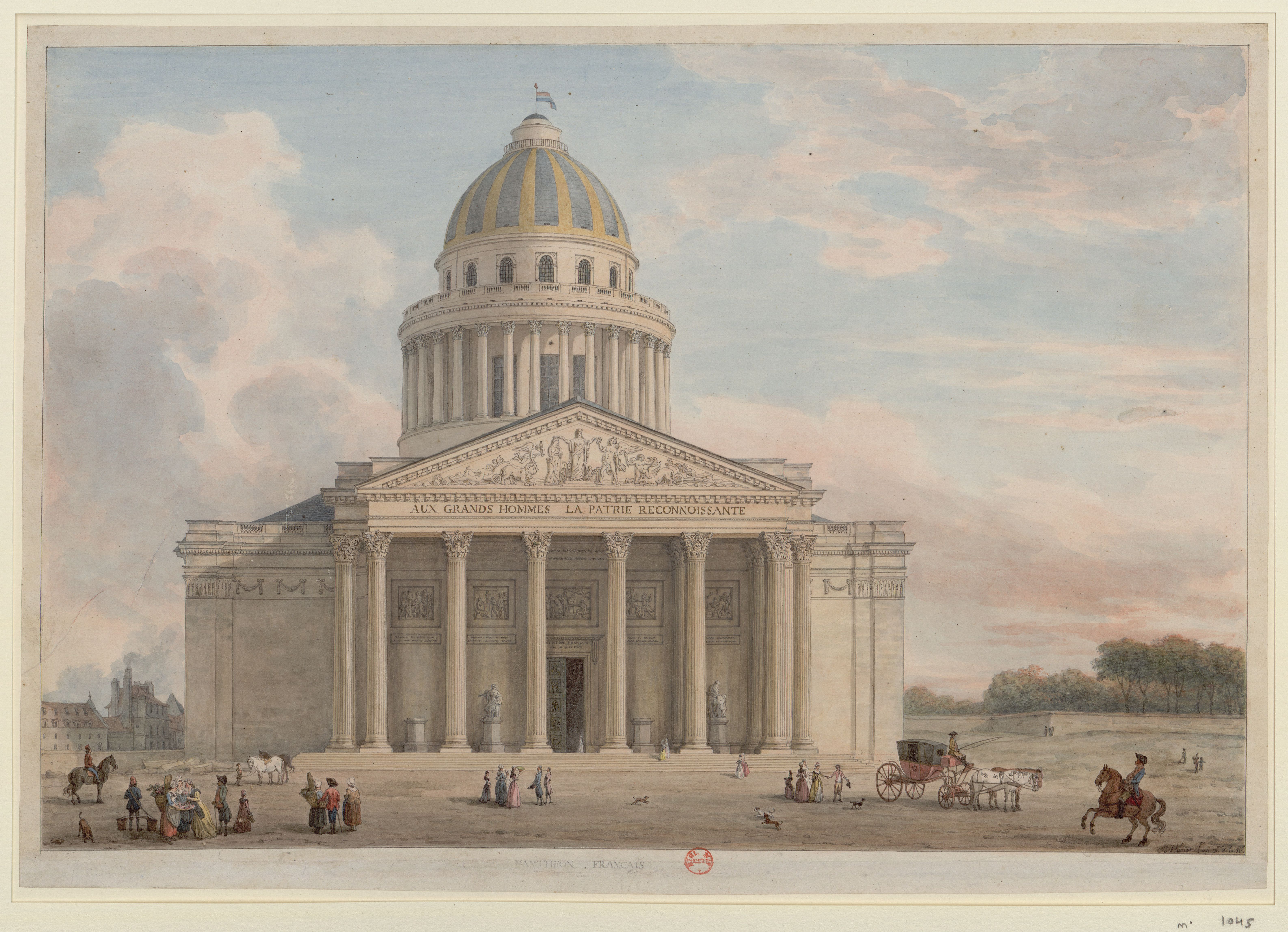 Le Panthéon de Paris en 1794-1795.